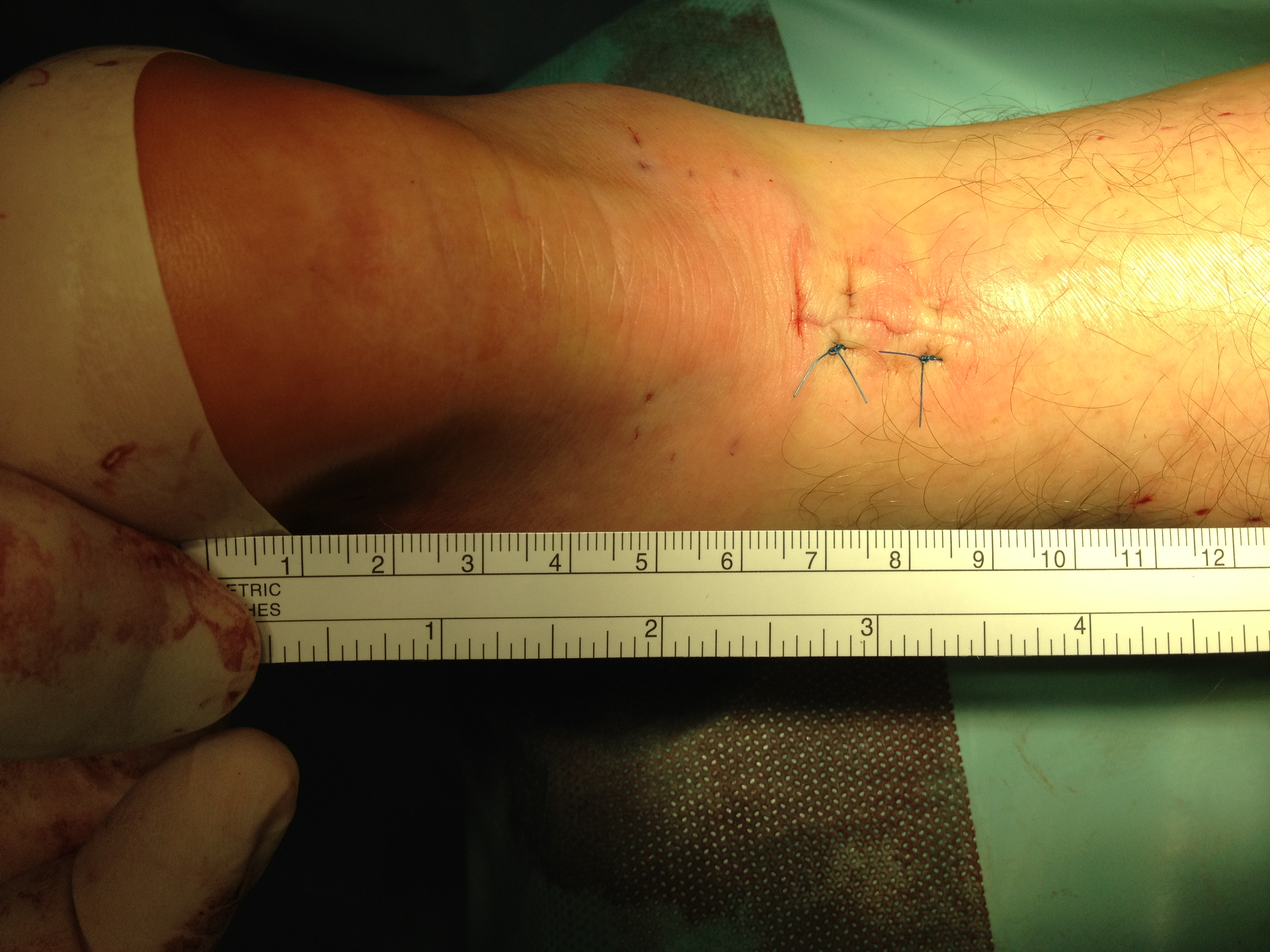 Achillessehnennaht MIC-Technik nach dem Wundverschluss